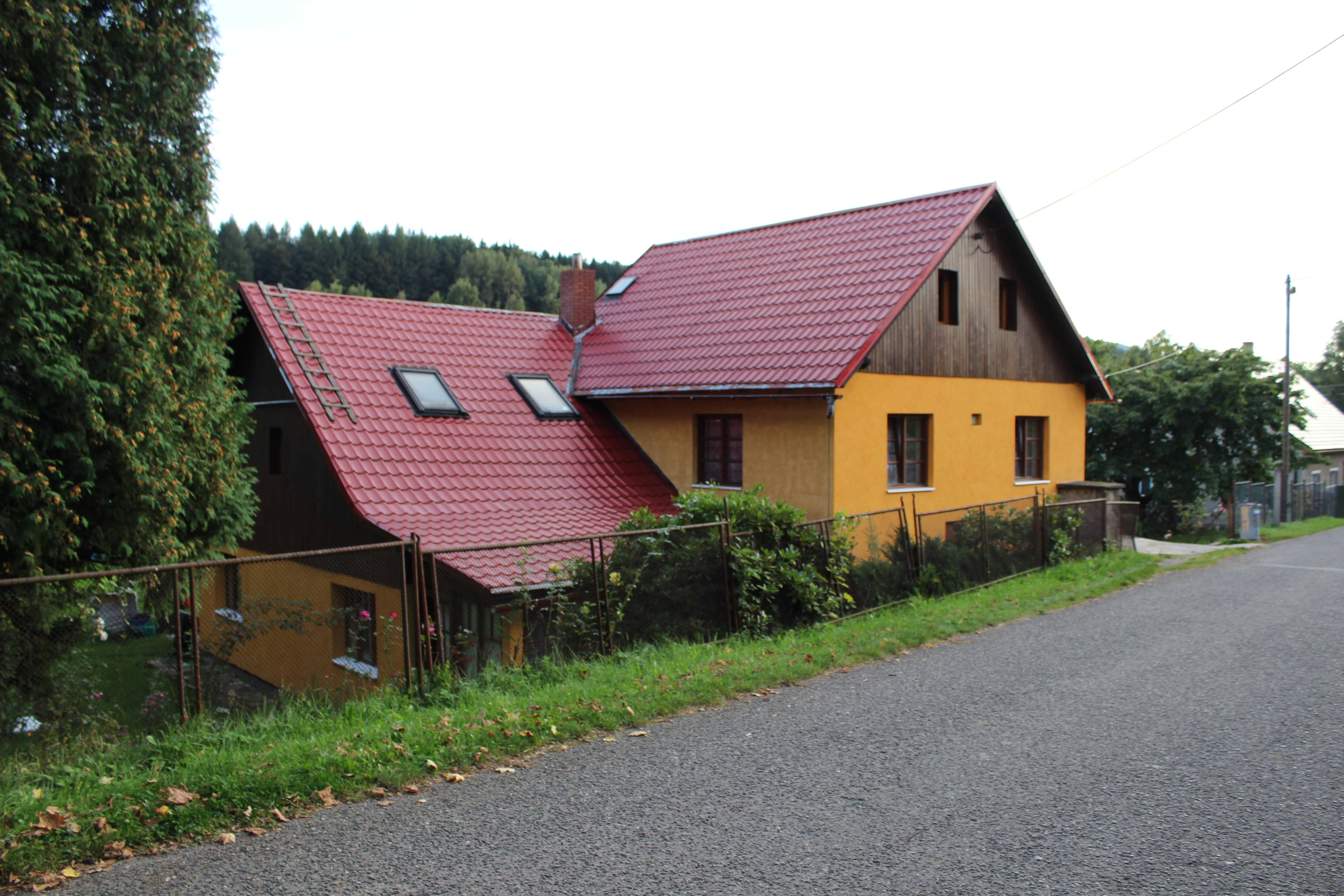 Dům číslo popisné 39 v Lázních Libverdě. V objektu sídlí Klokánek, jenž byl podle tvrzení Českého rozhlasu prvním takovým zařízením v České republice.